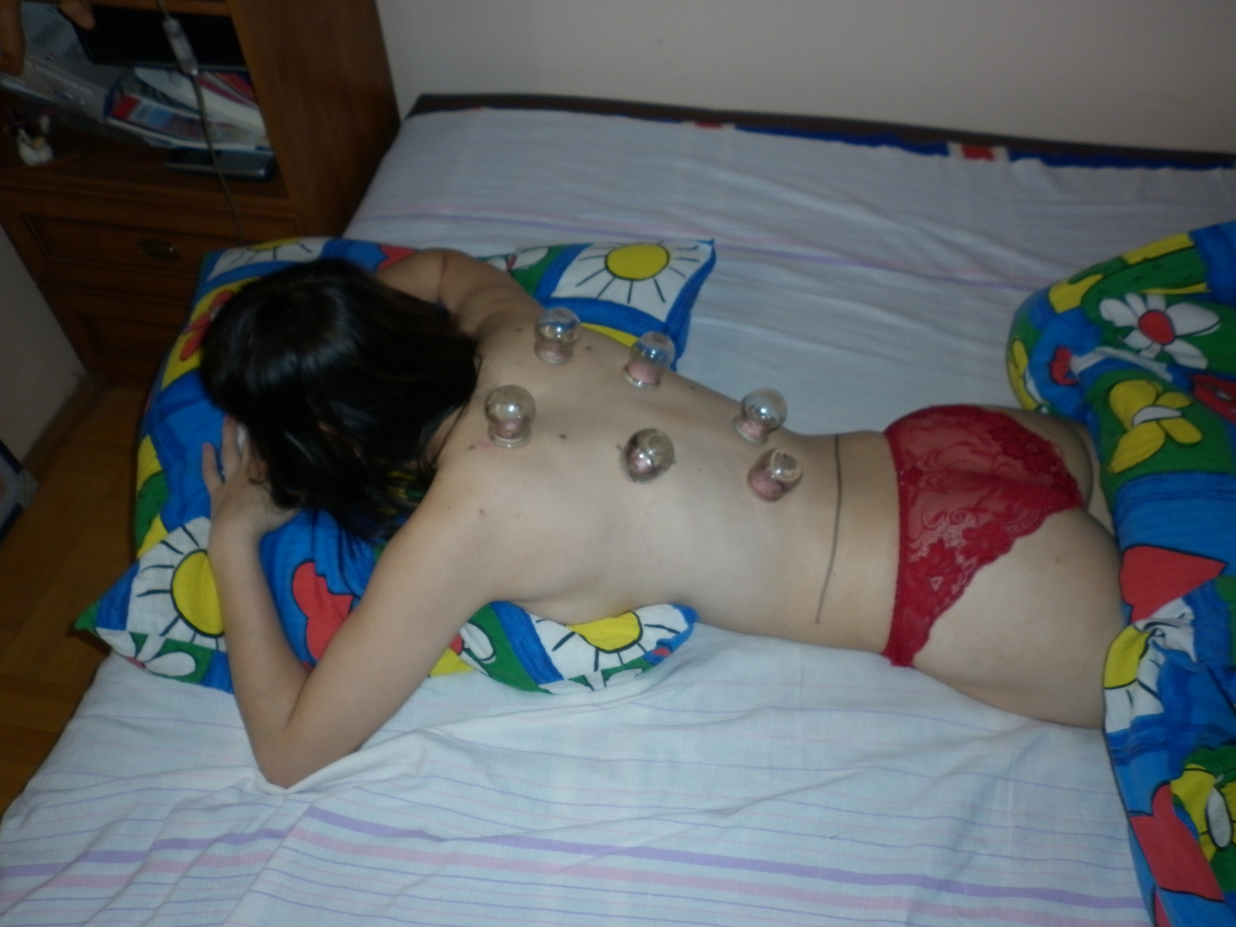 Bańki